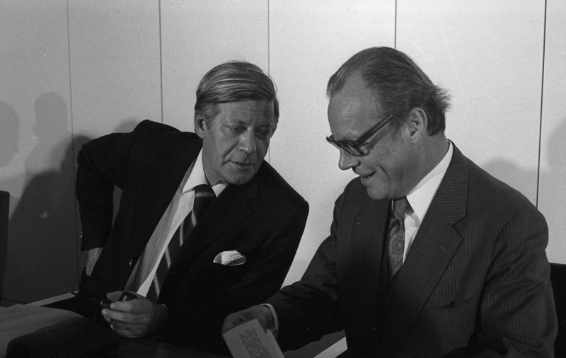 Sitzung des SPD-Präsidiums in der Friedrich-Ebert-Stiftung, Bonn (links: Helmut Schmidt, rechts: Willy Brandt)